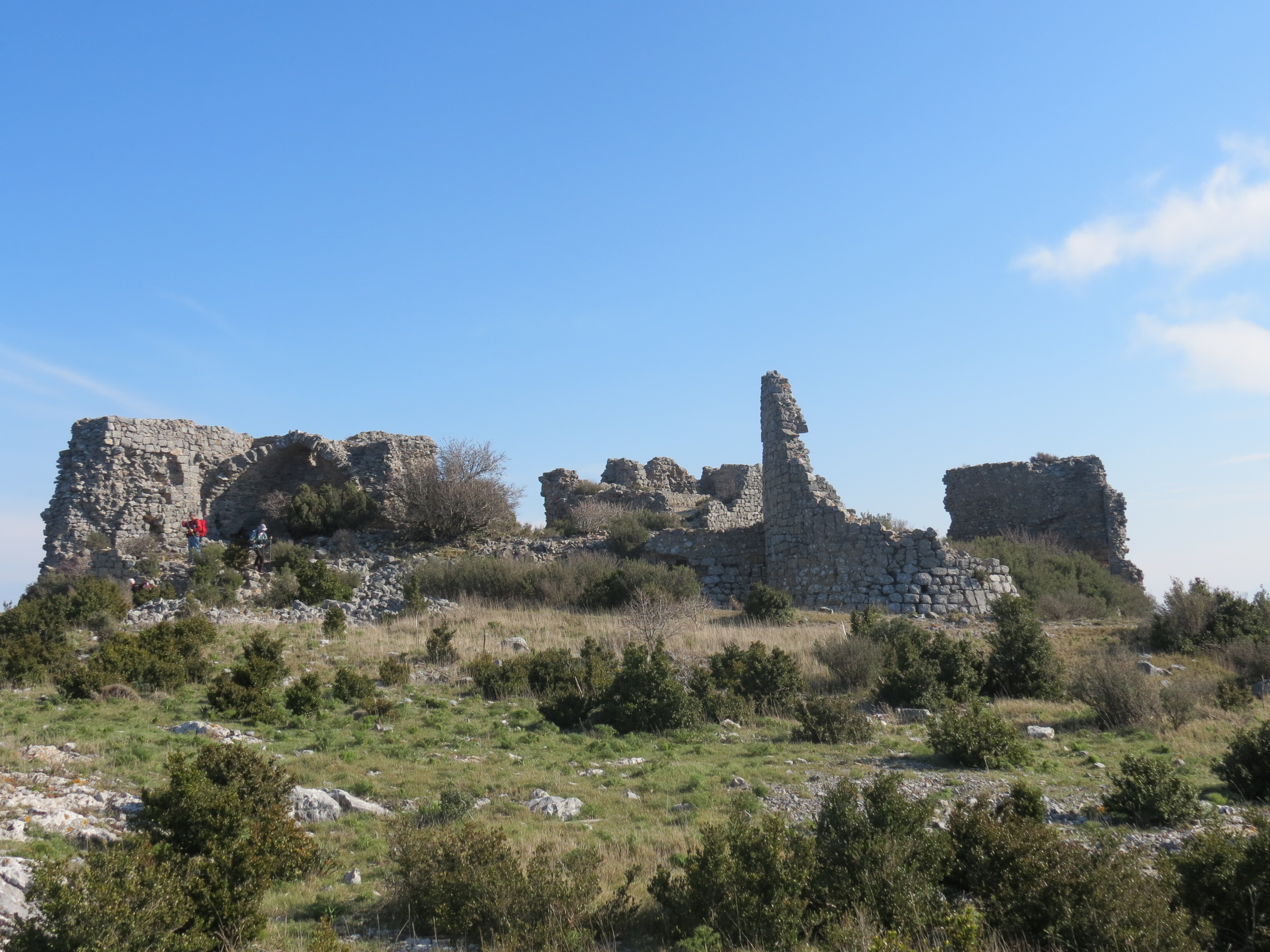 Château de La Salvaterra, Opoul-Périllos, Pyrénée-Orientale, Languedoc-Roussillon, France. - Google Maps - Google Earth